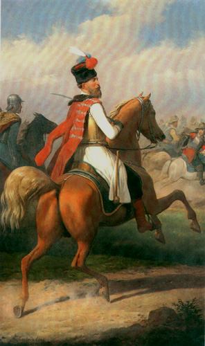 Беларуская (тарашкевіца): Ян Караль Хадкевіч